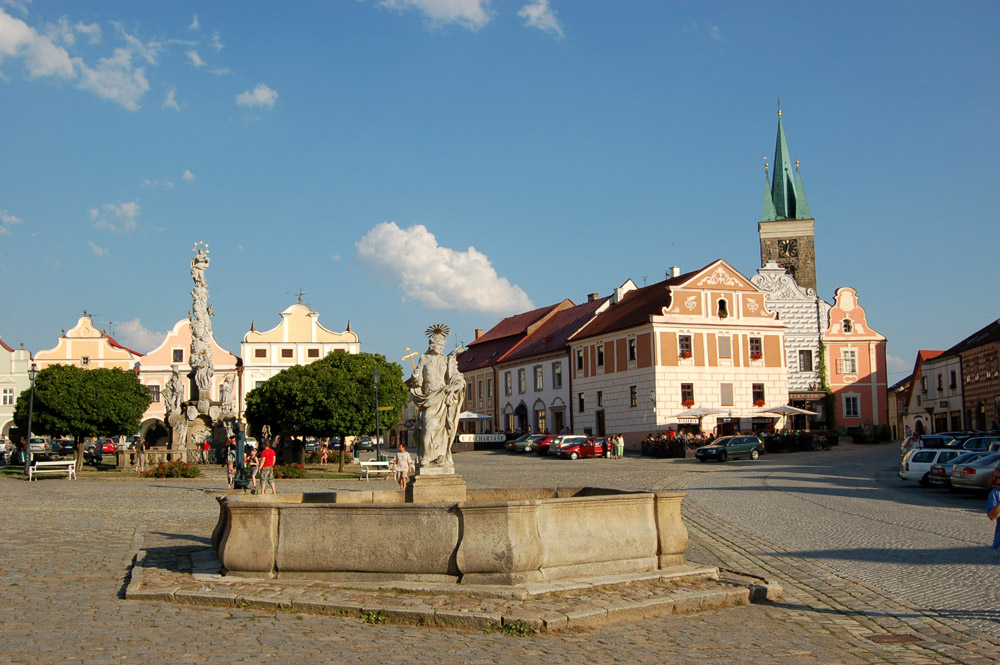 Jihovýchodní část náměstí Zachariáše z Hradce